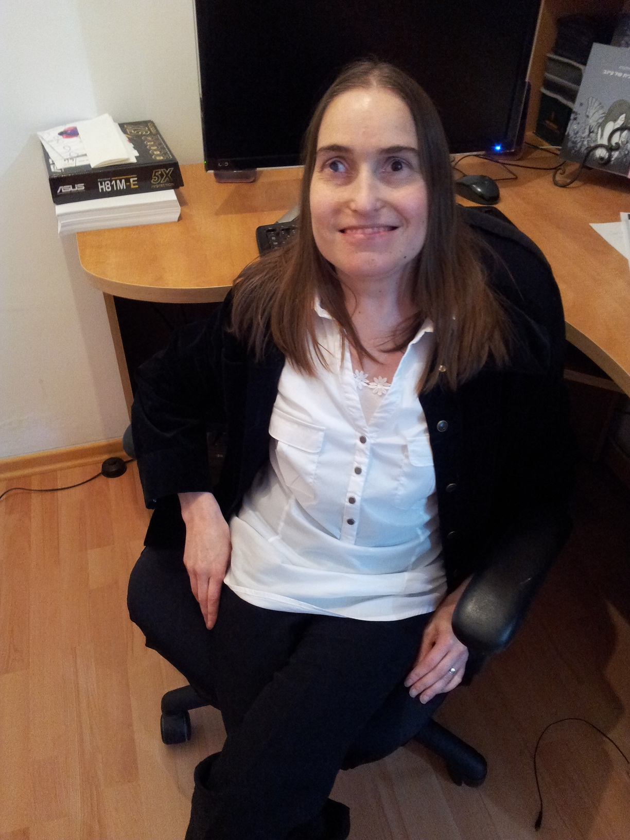 Nurit Peleg